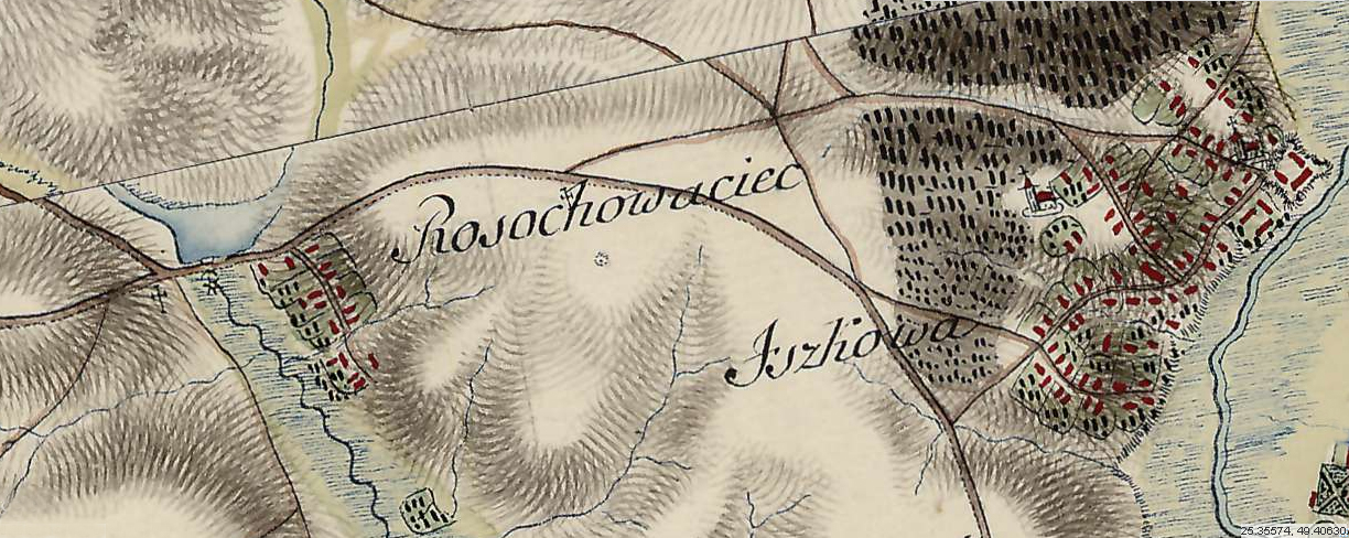 Ставок. Осінь